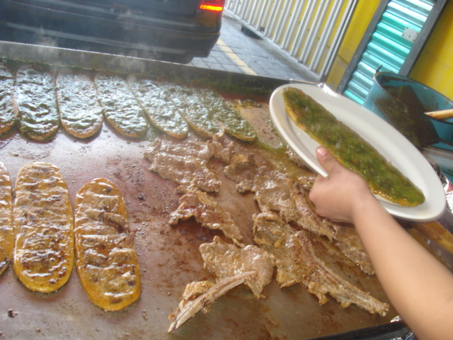 Huaraches en comal